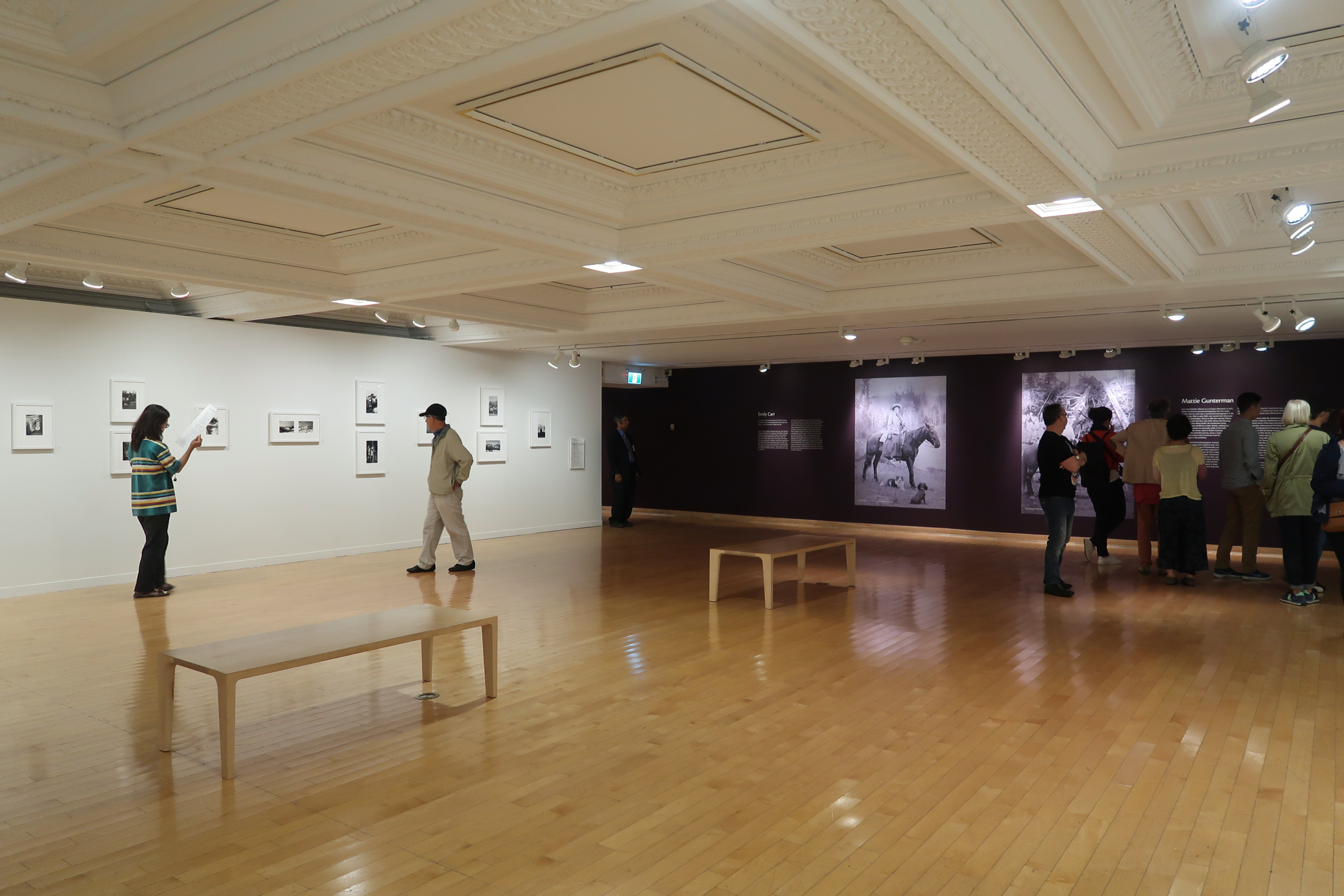 Vancouver Art Gallery Level 4